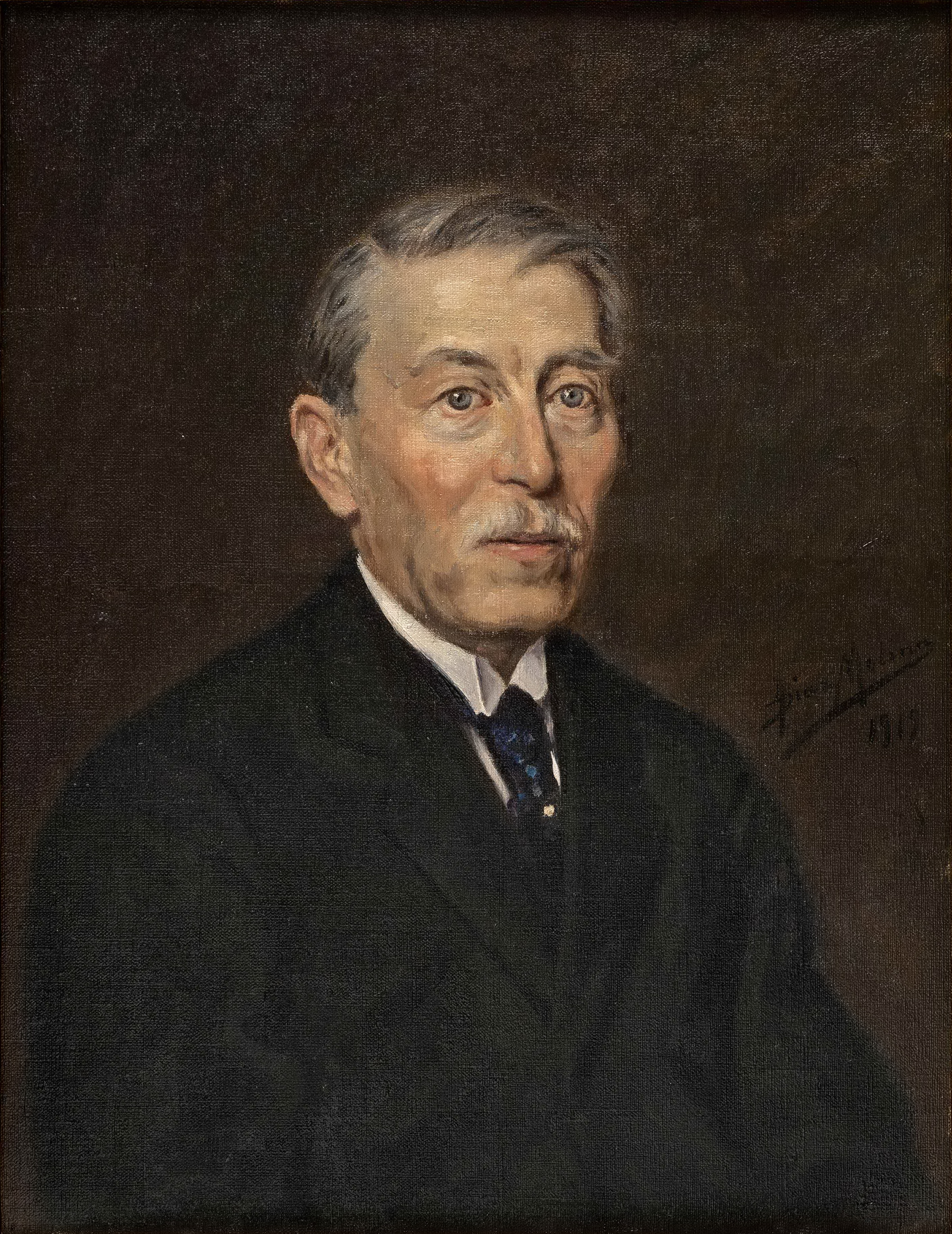 José Ramón Mélida. Número de inventario: 1990-123-5.